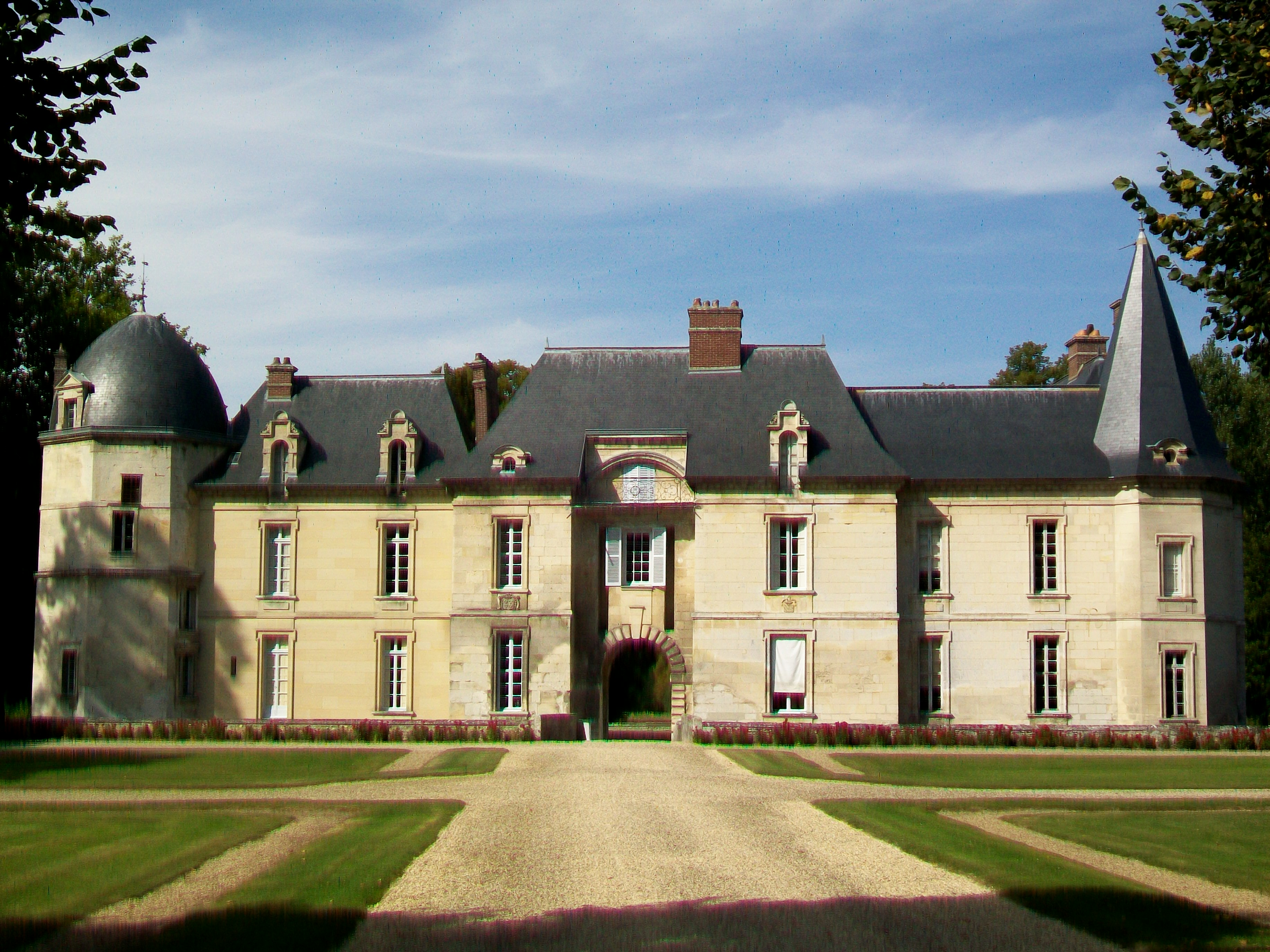 Le château ; façade sud.